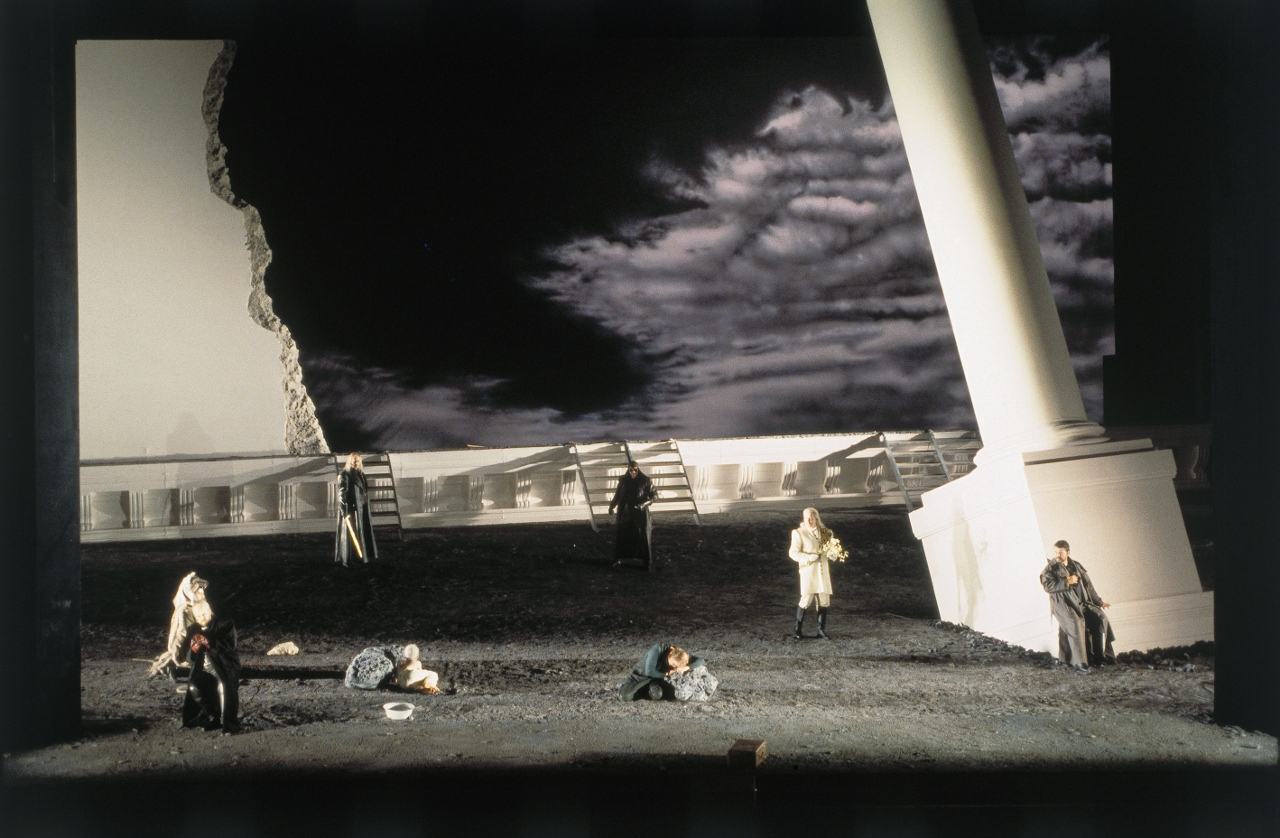 טנהויזר, במאי: דייוויד אולדן, עיצוב תפאורה: רוני תורן, עיצוב תלבושות: בוקי שיף, עיצוב תאורה: פט קולינס. האופרה הבווארית, מינכן, גרמניה, 1994. צלם : וילפריד הוזל